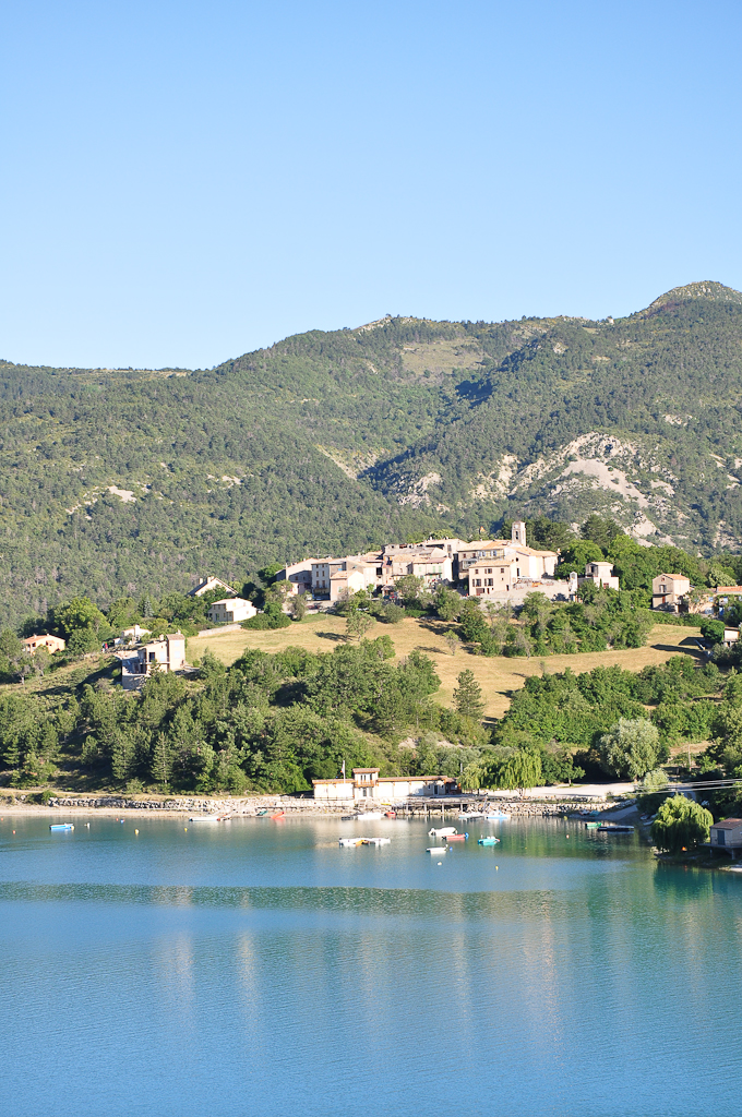 Saint-Julien dominant le Verdon